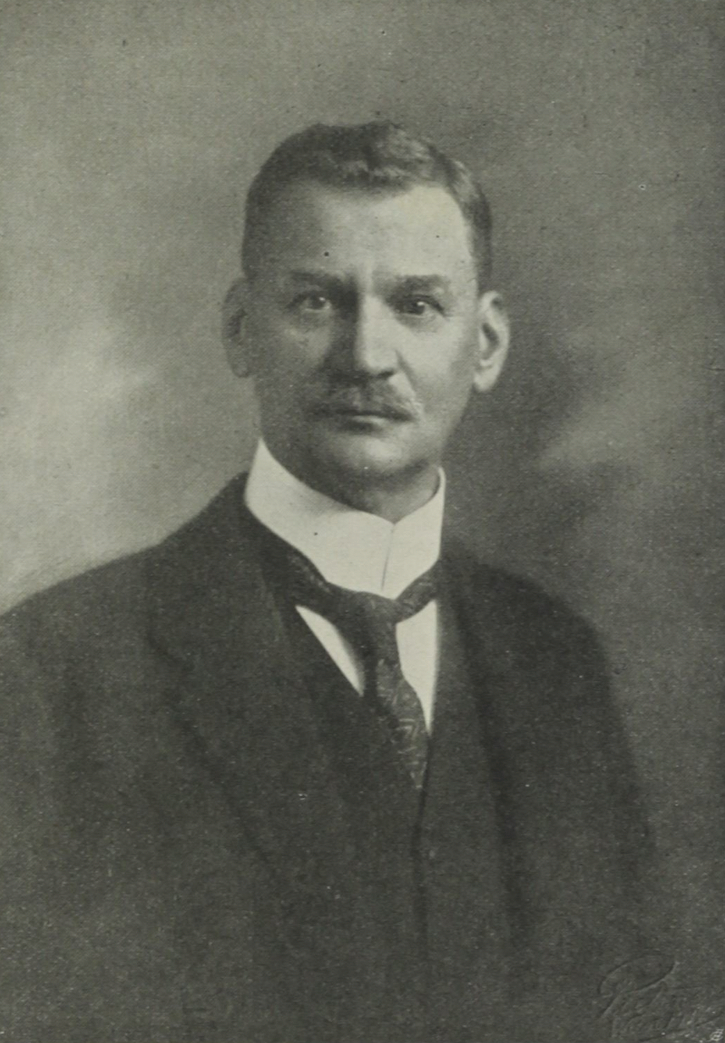 Hugo Ritter von Schauer (1862–1920), Austrian jurist and politician K. k. Justizminister Exz. Dr. Hugo Ritter von Schauer